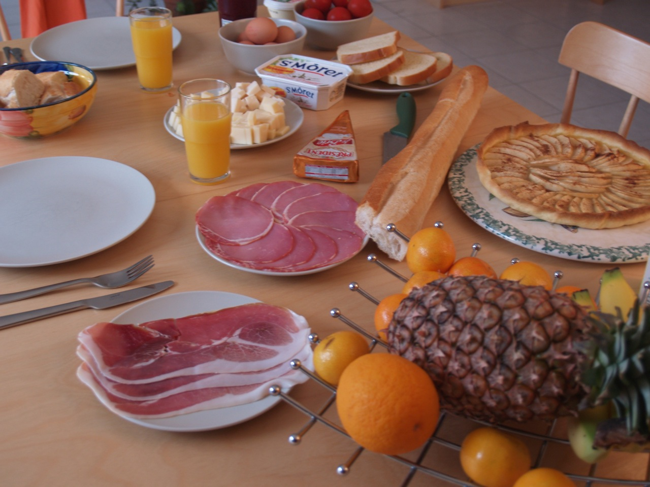 Petit brunch